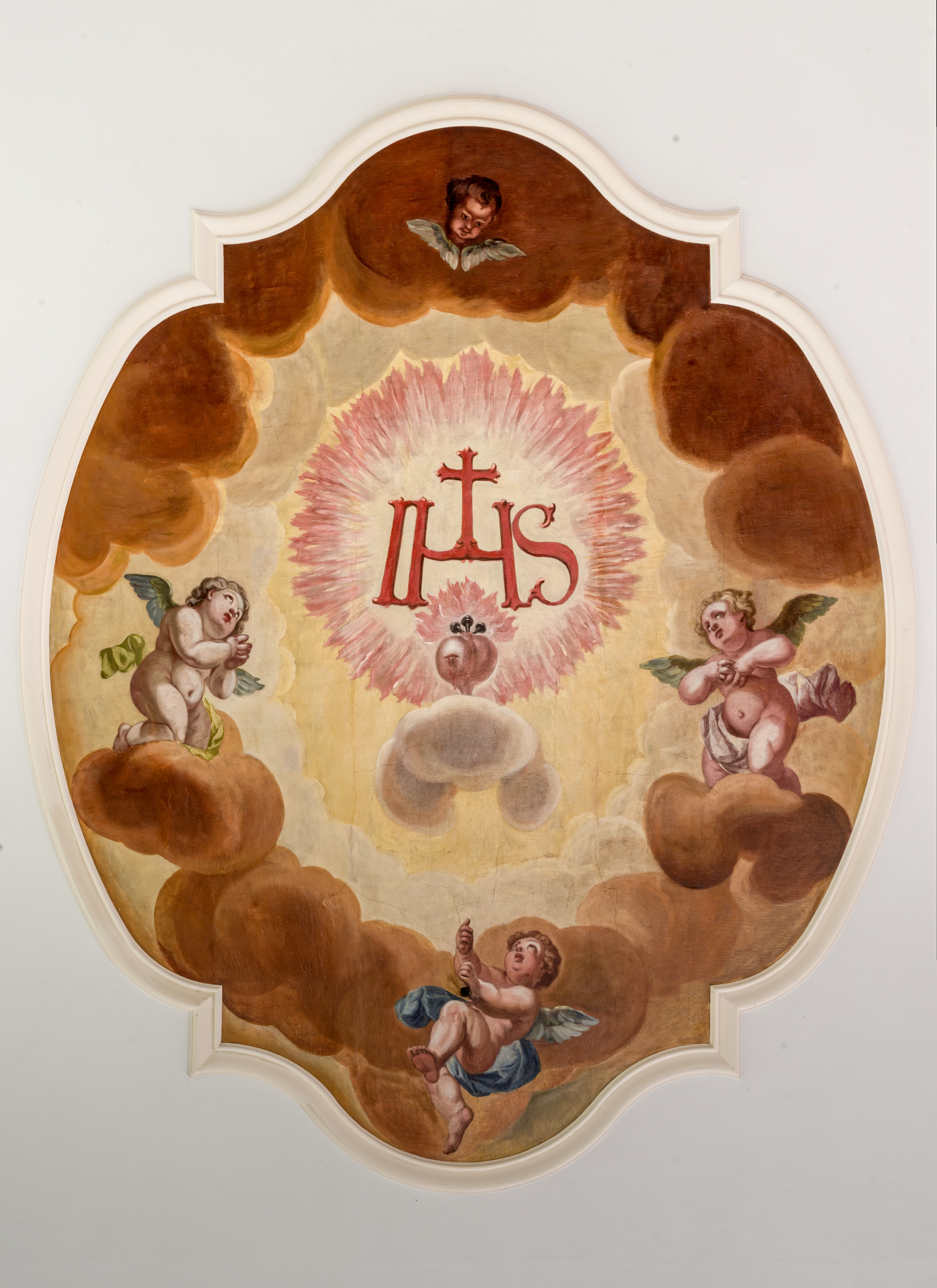 Bilder aus Oberried Deckengemälde im Chor